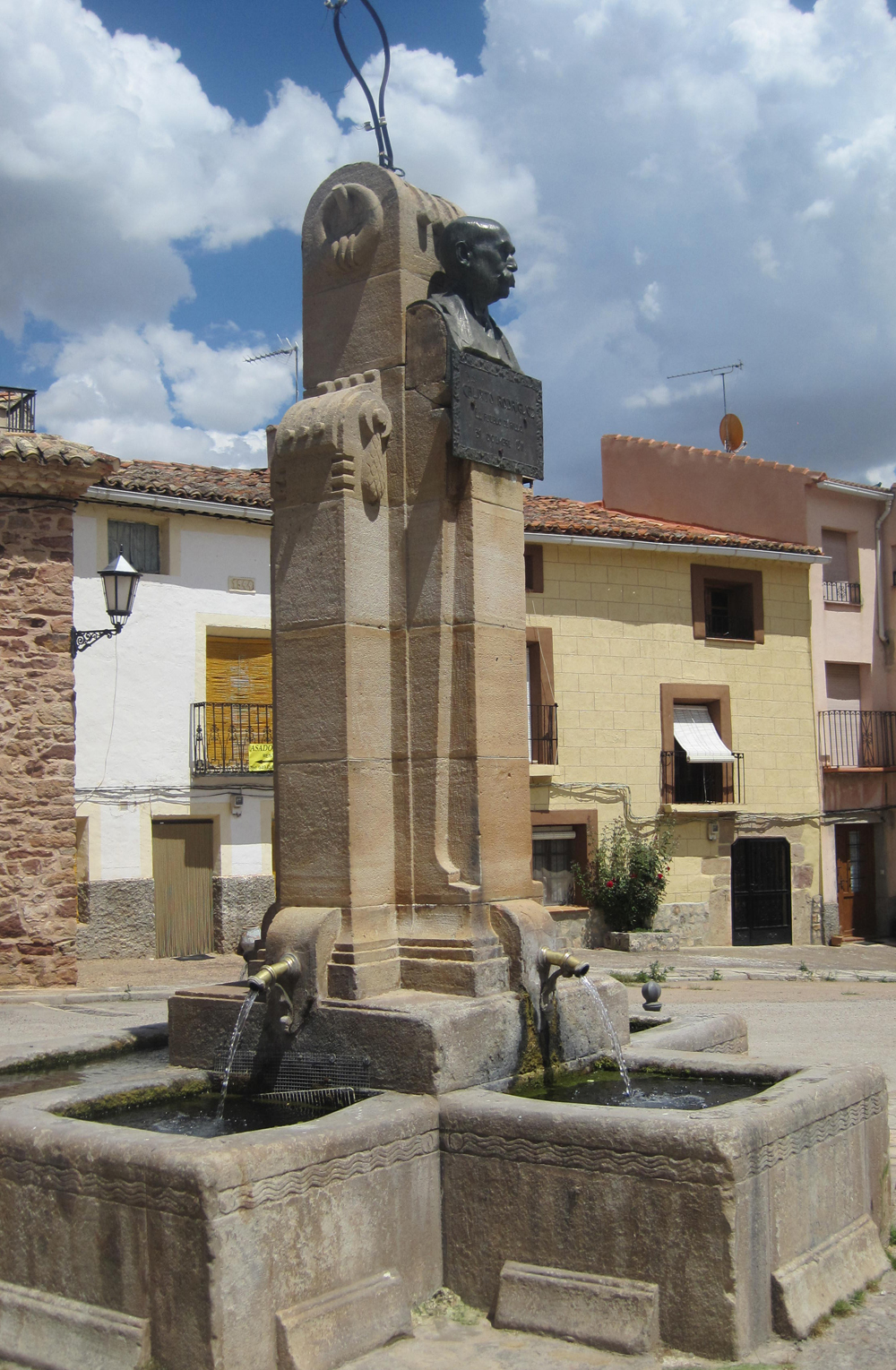 La fuente de Rillo de Gallo en una foto reciente que mejora la que se expone ahora en la página de Rillo de Gallo en wikipedia